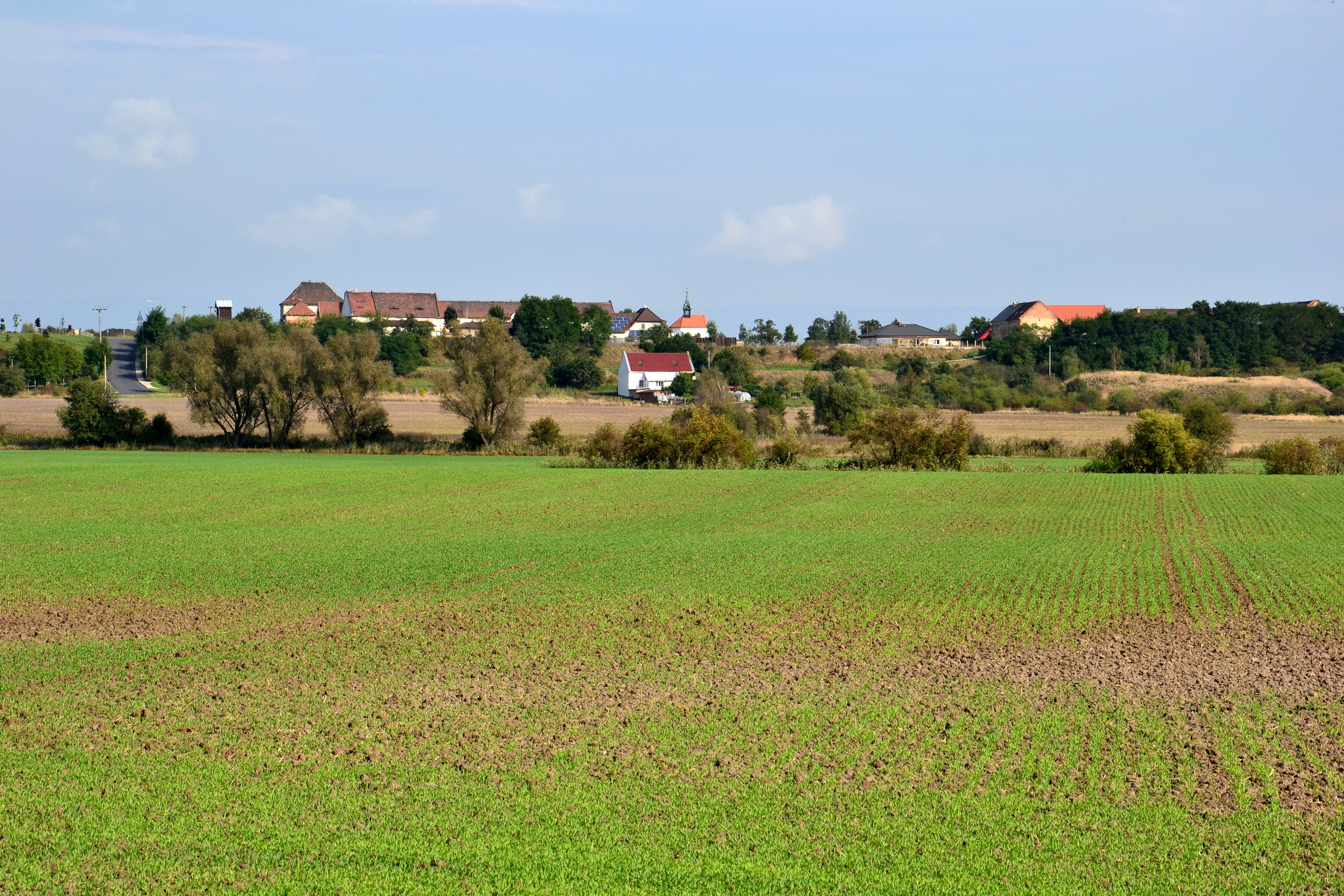 Vysoké Březno od jihu